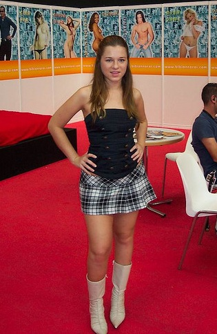 Monica Vera, FICEB 2006